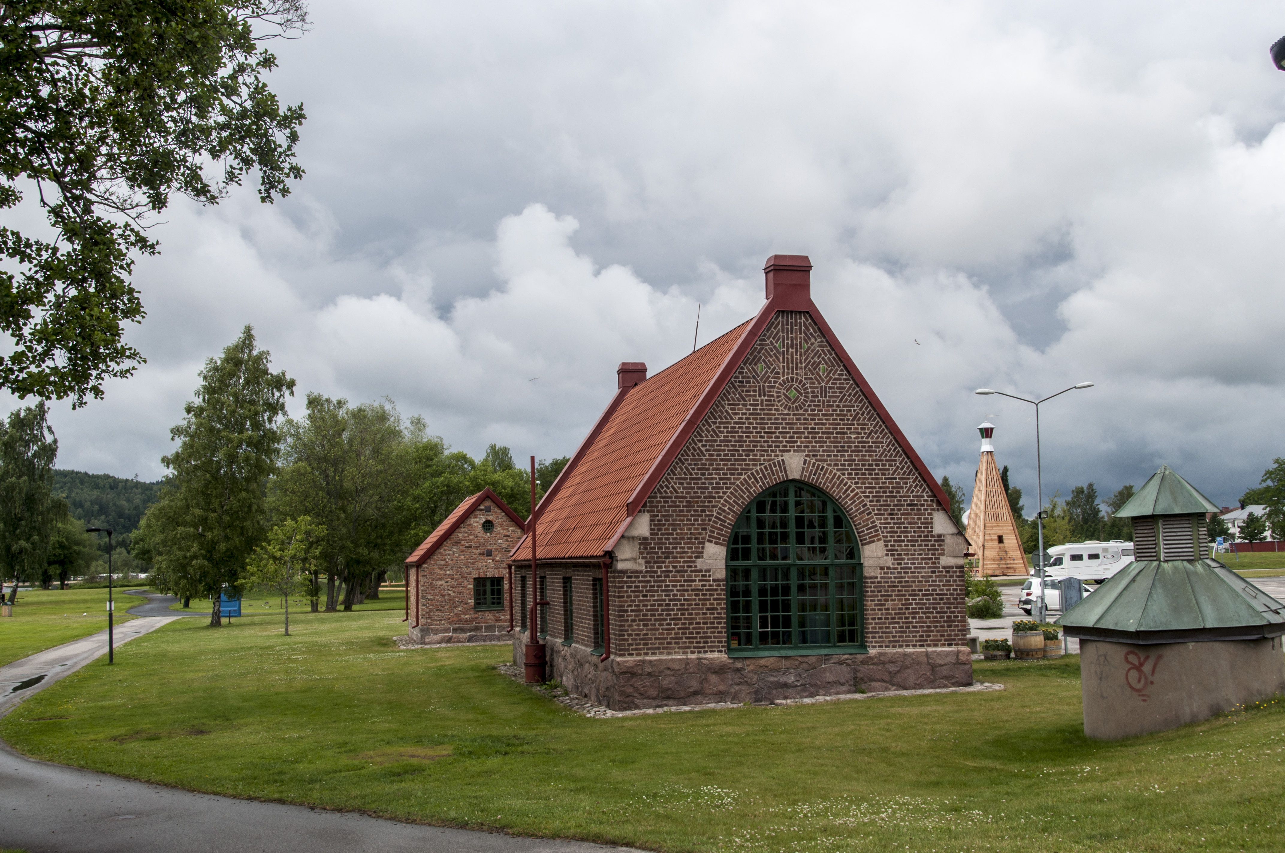 Gamla vattenverket i Ulricehamn.Uppfördes 1914 och ritades av civilingenjören Per Gustav Blidberg.